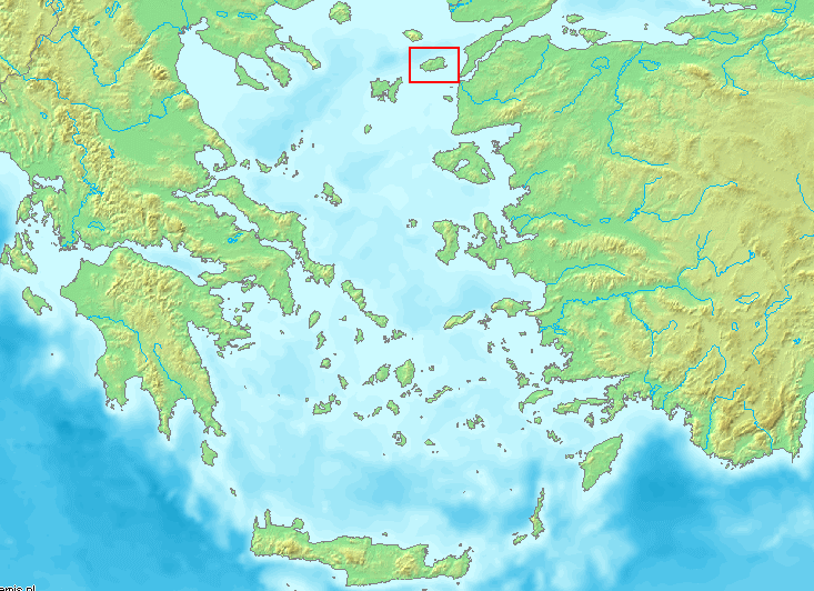 Gökçeada